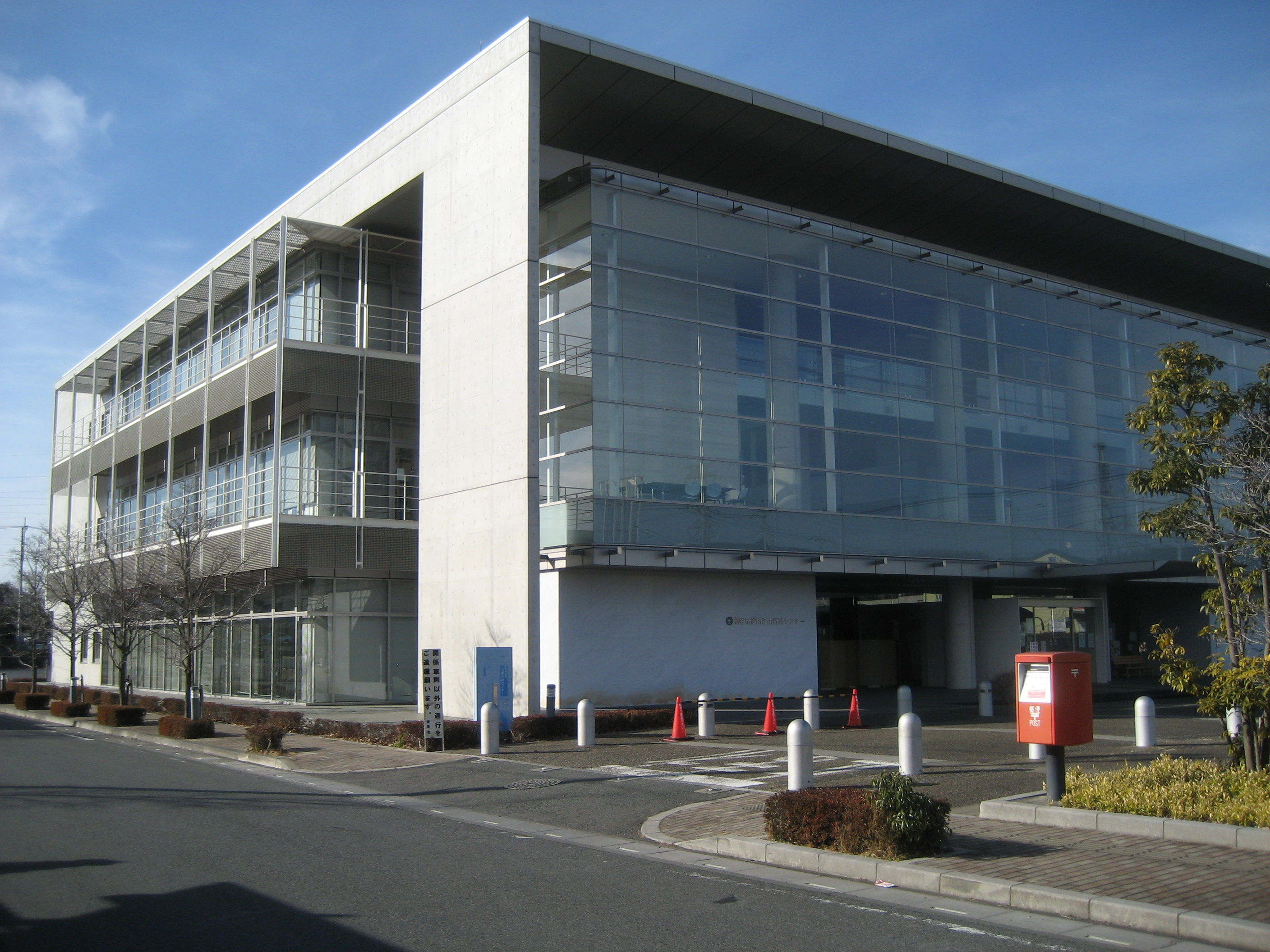 熊谷市役所江南行政センター庁舎（旧江南町役場庁舎）